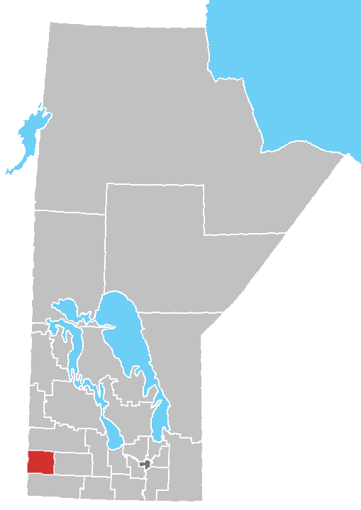 Manitoba census area No. 6